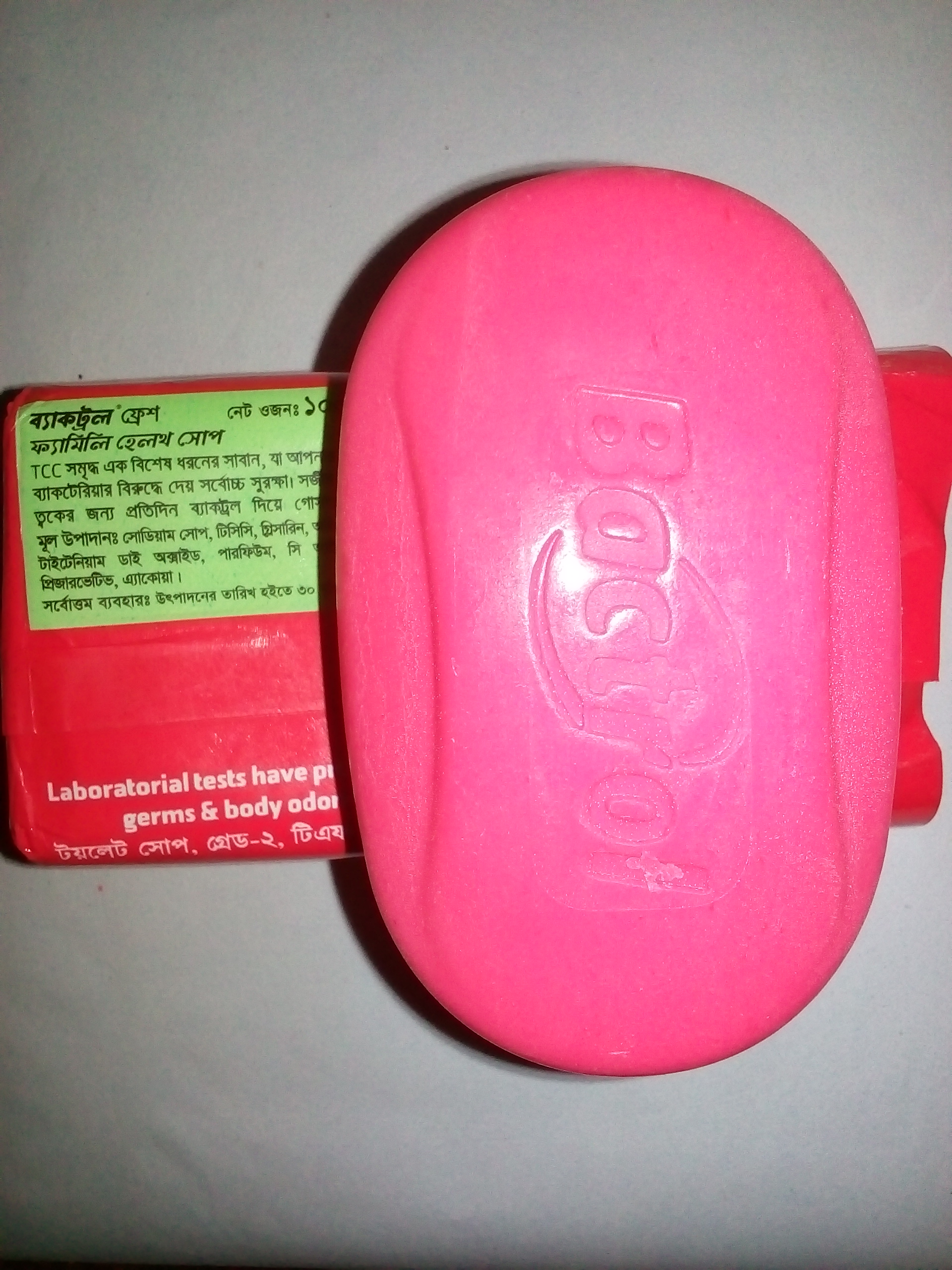 বাংলাদেশী কোম্পানির তৈরি গোসলের জন্য জীবাণুনাশক সাবান।